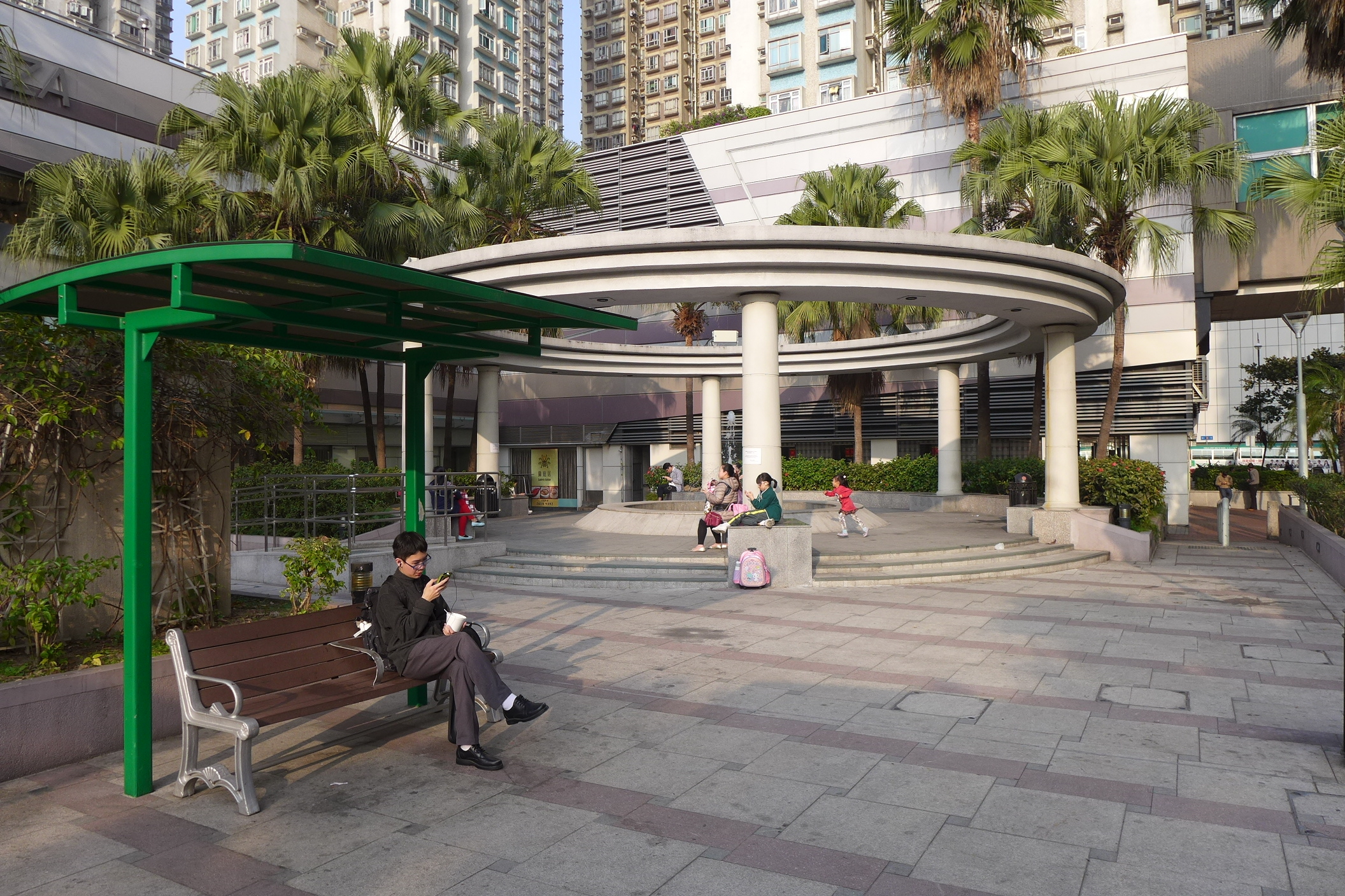 Trend Plaza Rest area